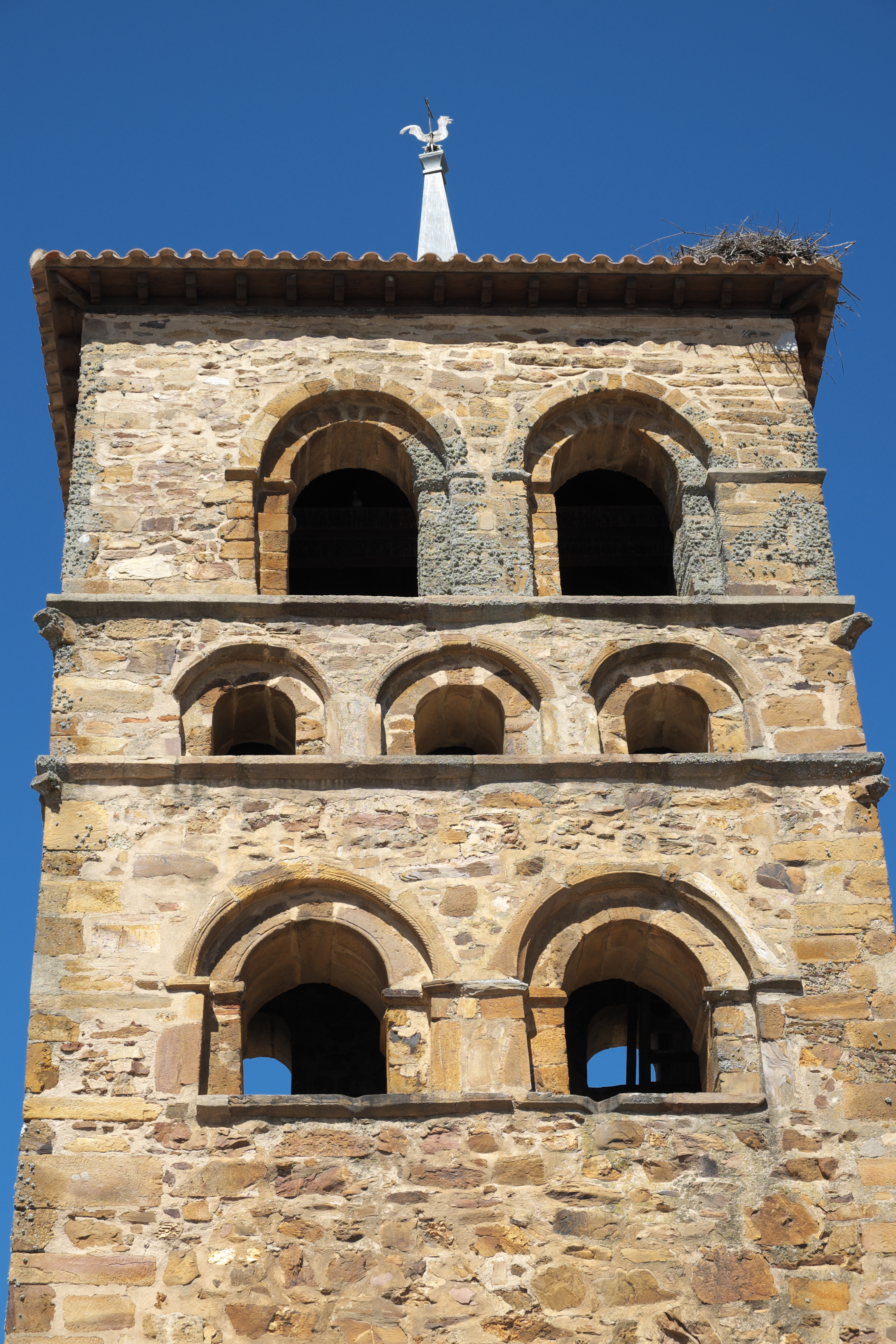 Katholische Pfarrkirche Santa María in Tábara in der Provinz Zamora in Kastilien und León (Spanien)